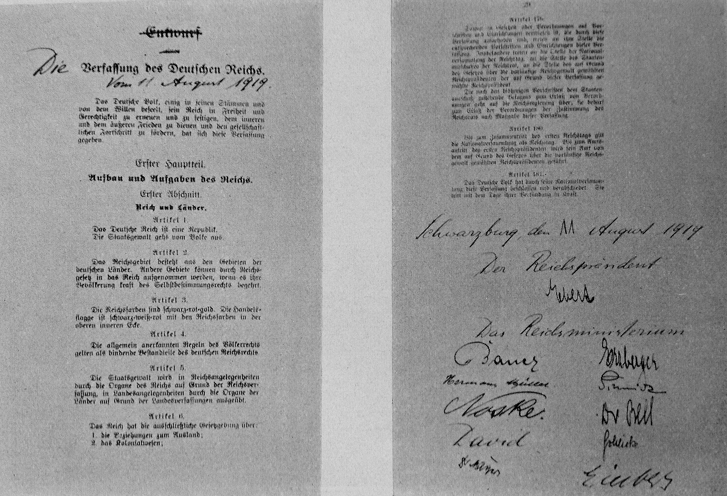 Verfassung des Deutschen Reiches vom 11. August 1919, erste und letzte Seite.